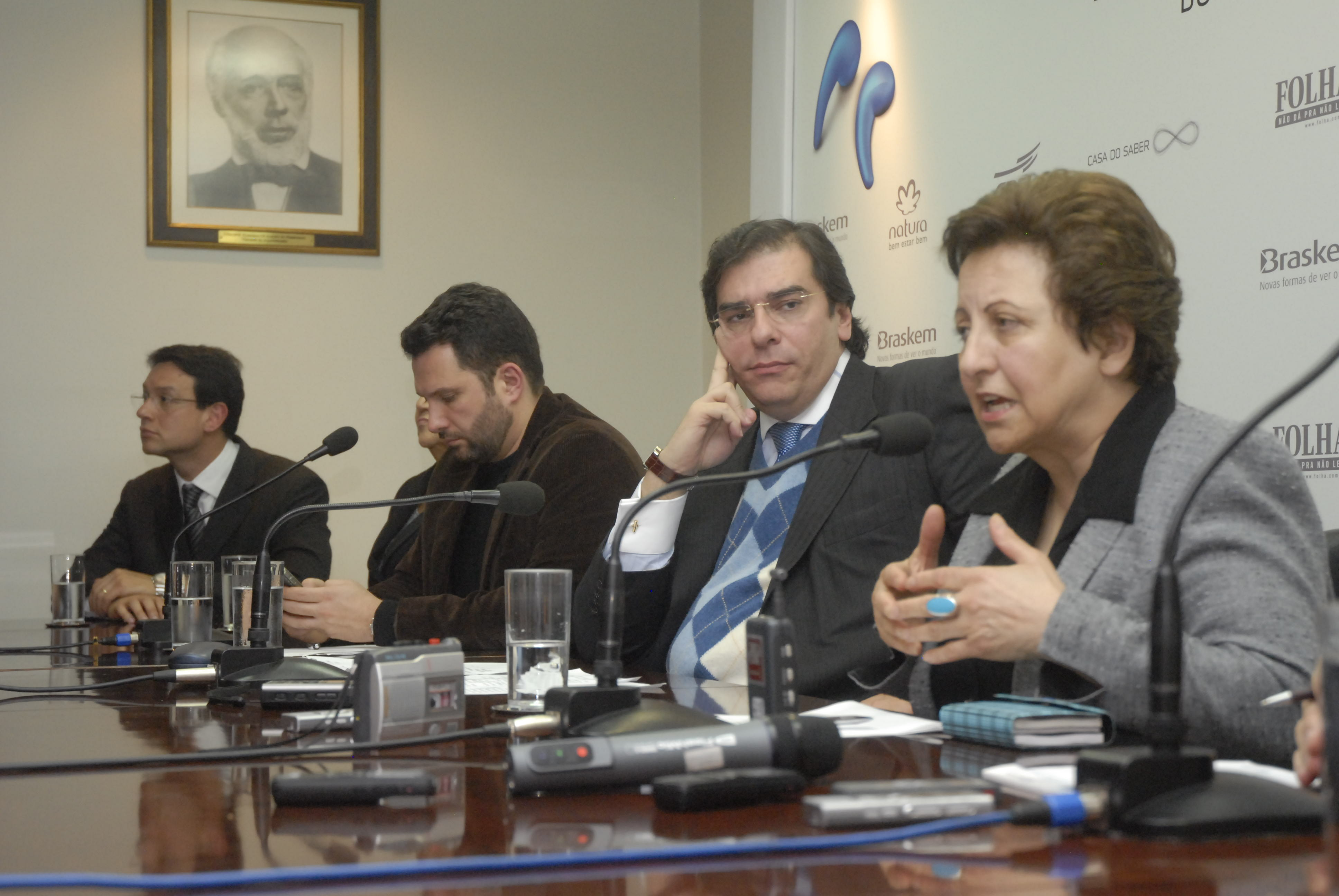 Shirin Ebadi em coletiva de imprensa - Fronteiras do Pensamento São Paulo 2011